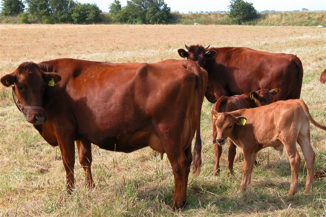 Birkholm cows